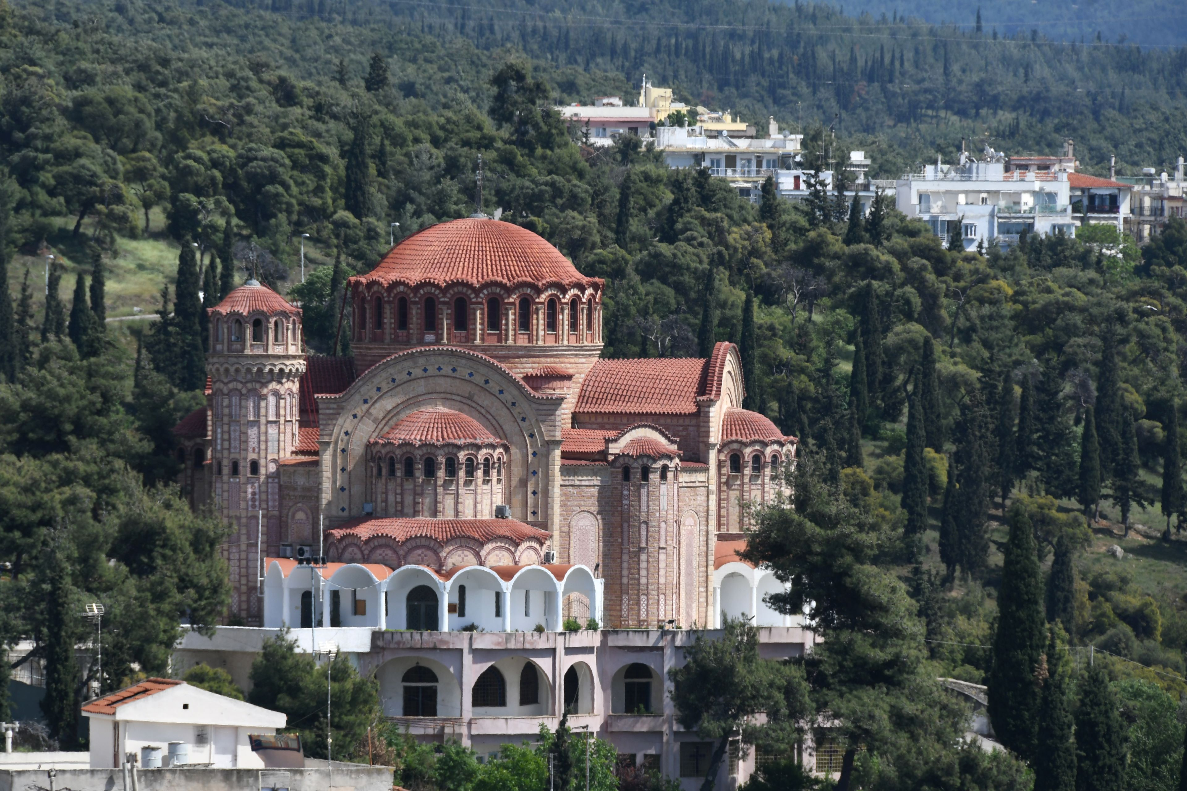 Thessaloniki, Ausblick vom Kloster Vlatadon (Μονή των Βλατάδων) (14. Jhdt.)